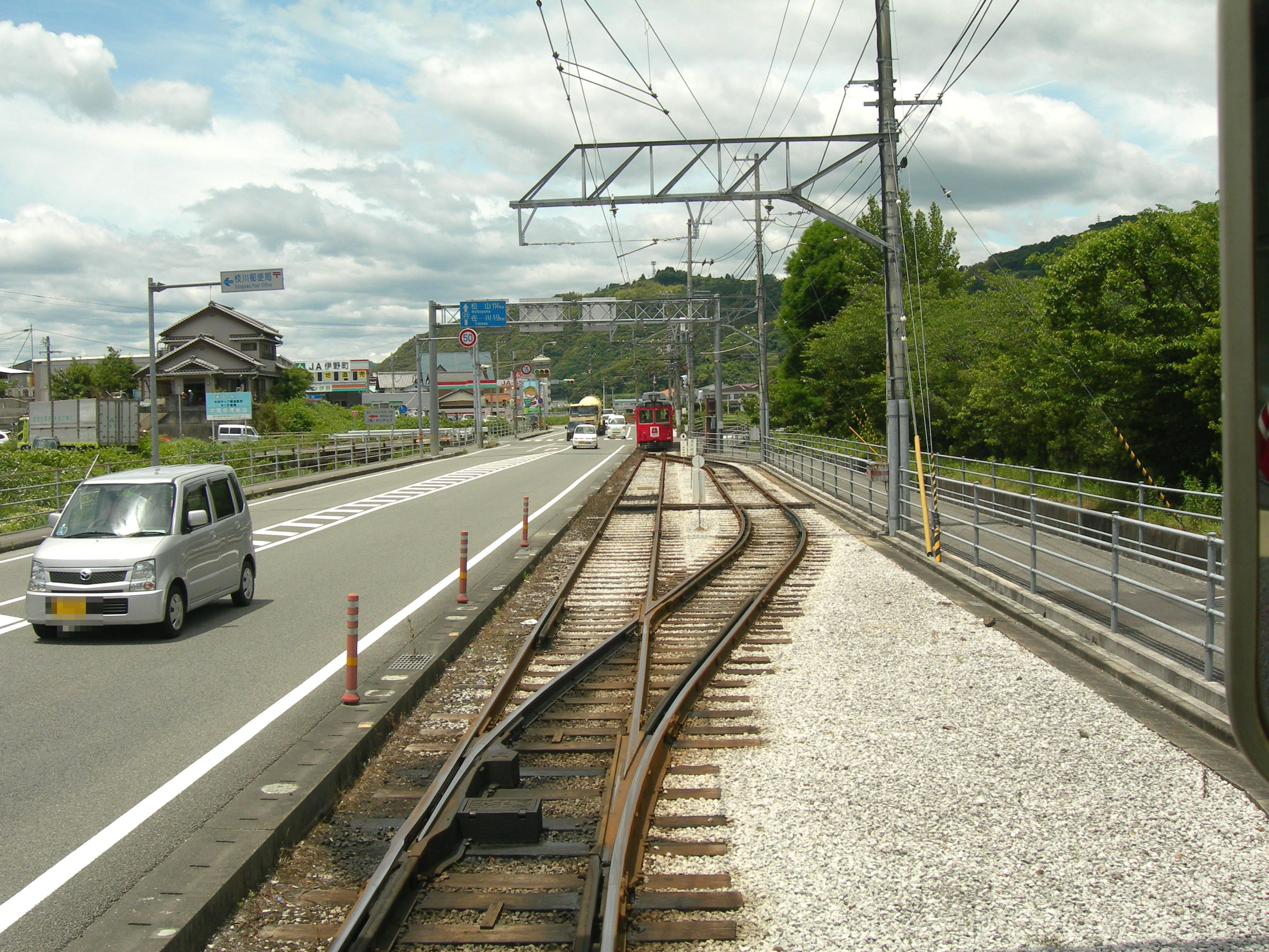 土佐電気鉄道八代信号所。